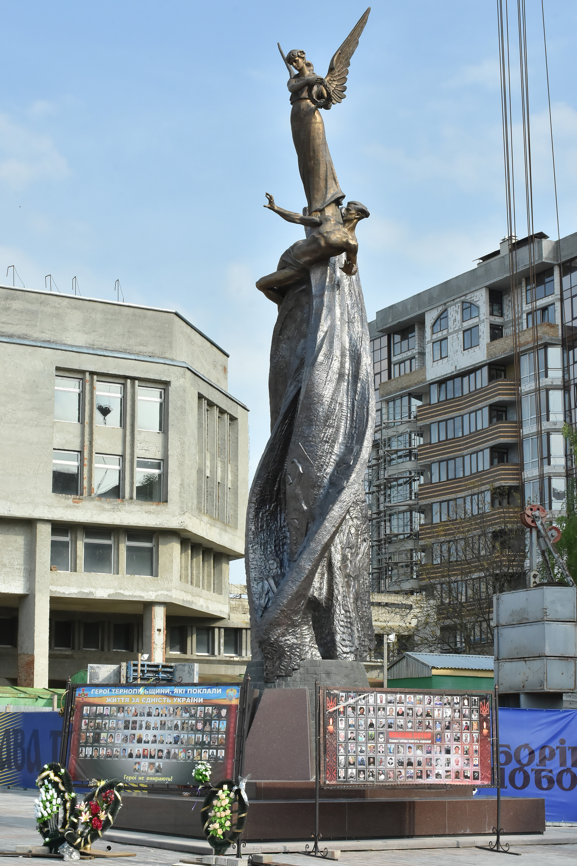 Пам'ятник Небесній сотні на Площі Героїв Євромайдану в Тернополі.